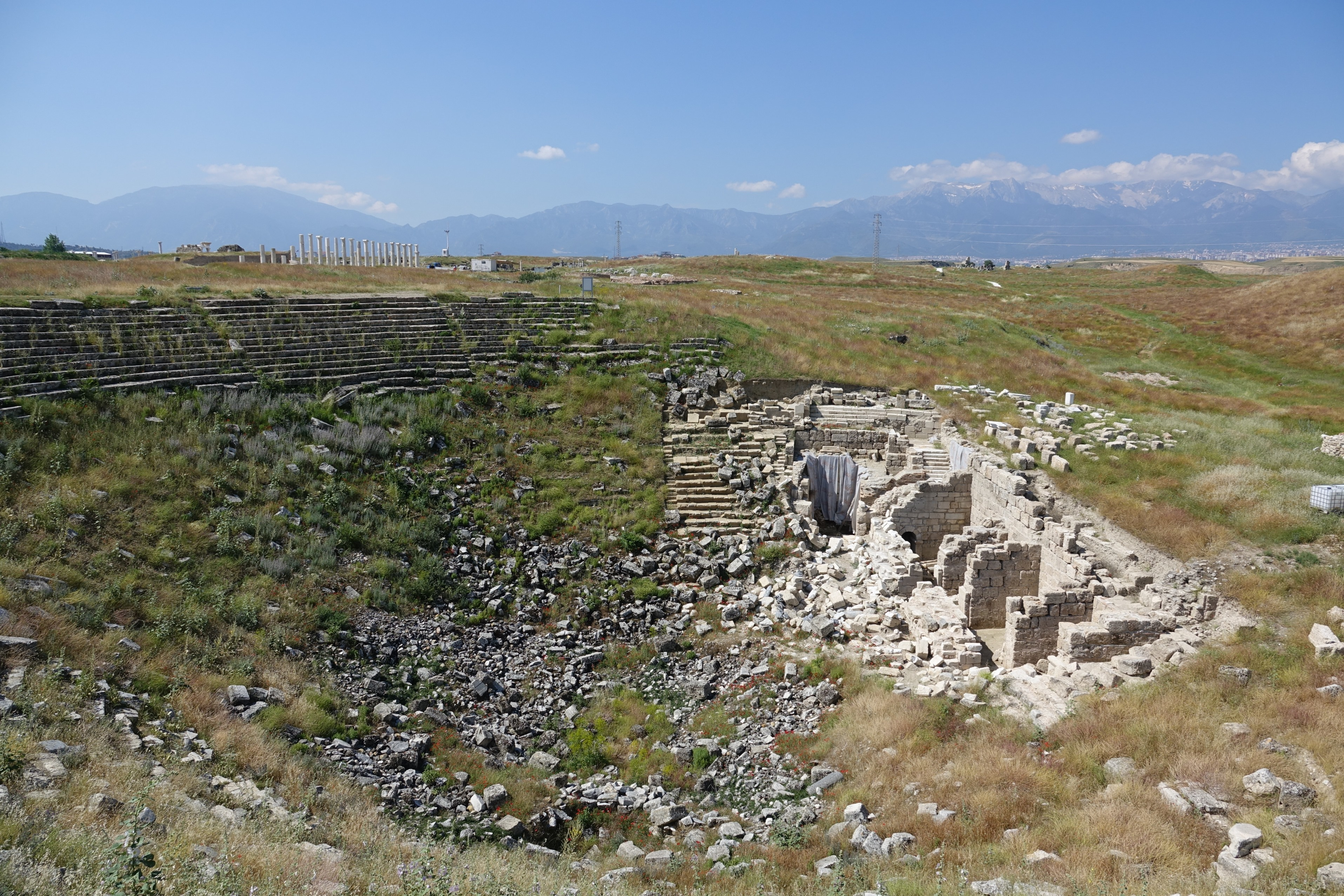 Blick auf das westliche Theater und Umfeld